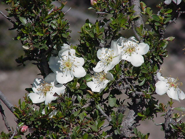 Las fotografias fueron tomadas al sur de la ciudad de Saltillo Coahuila mexico a 34 kilometros a 2200 msnm